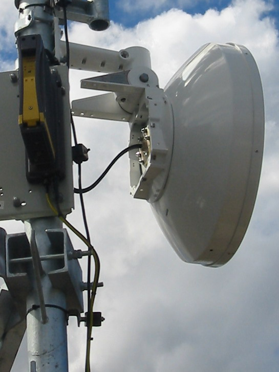 Antena mikrofalowa, z lewej żółty outdoor unit produkcji firmy Nera.